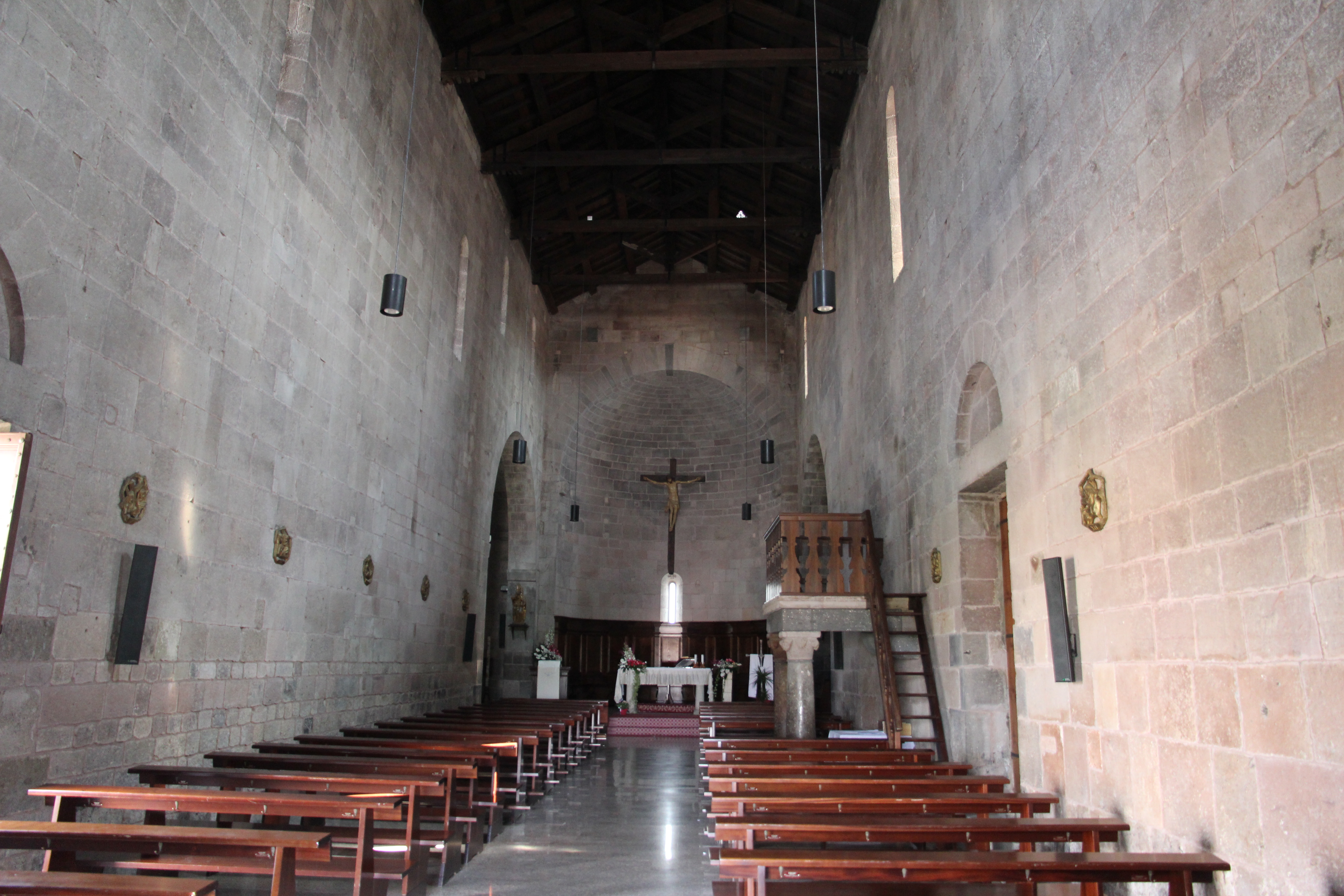 Ottana - Chiesa di San Nicola